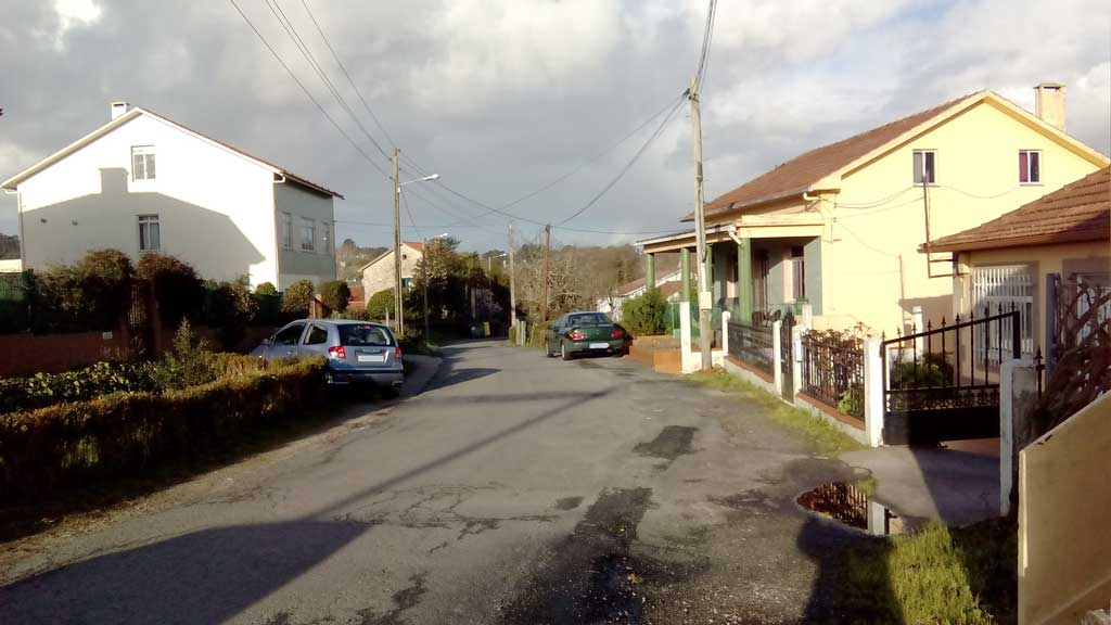 Vista de Aneiros, Ferrol.